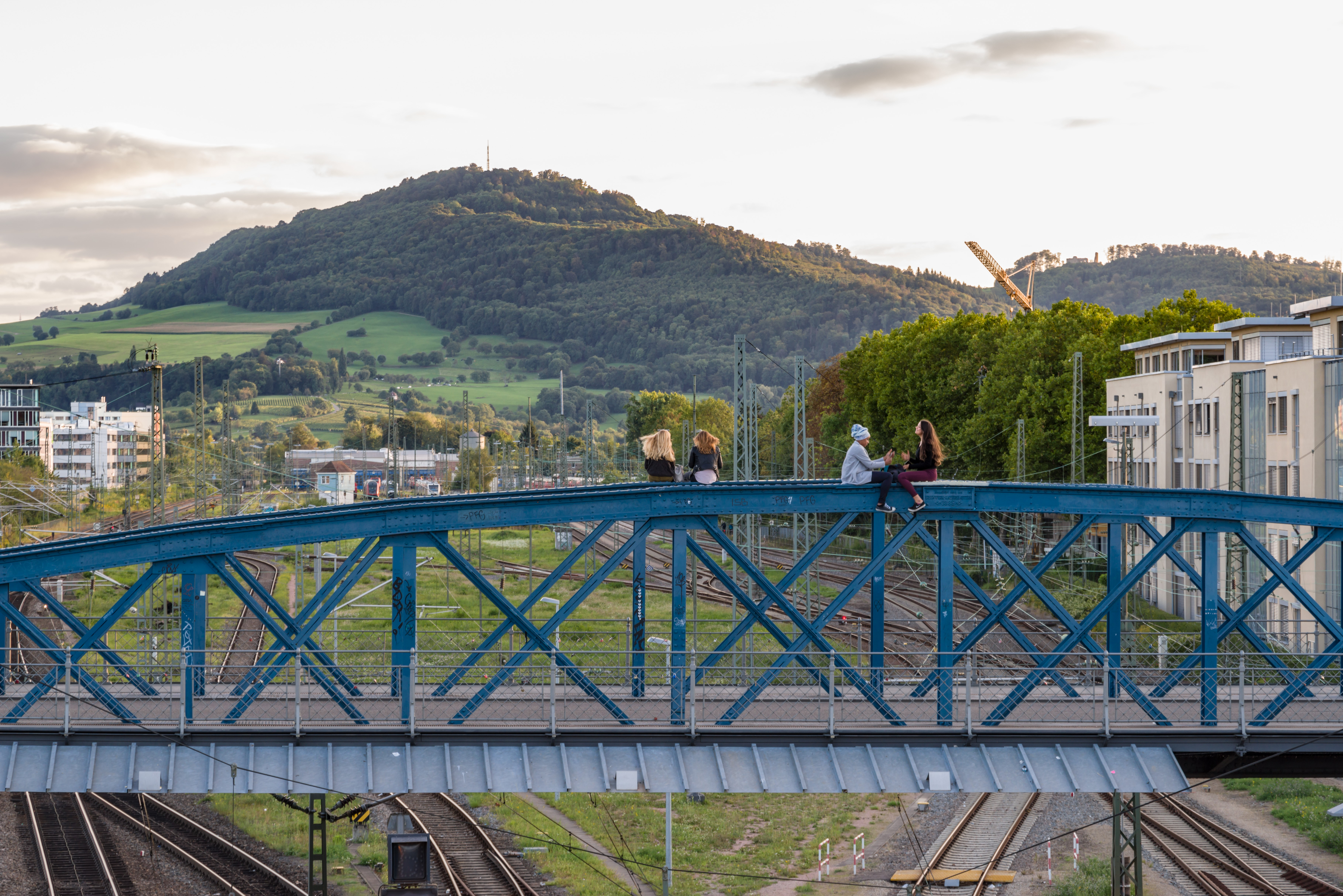 Bilder aus Freiburg im Breisgau Ende der Heimfahrt von der Wikicon in Freiburg